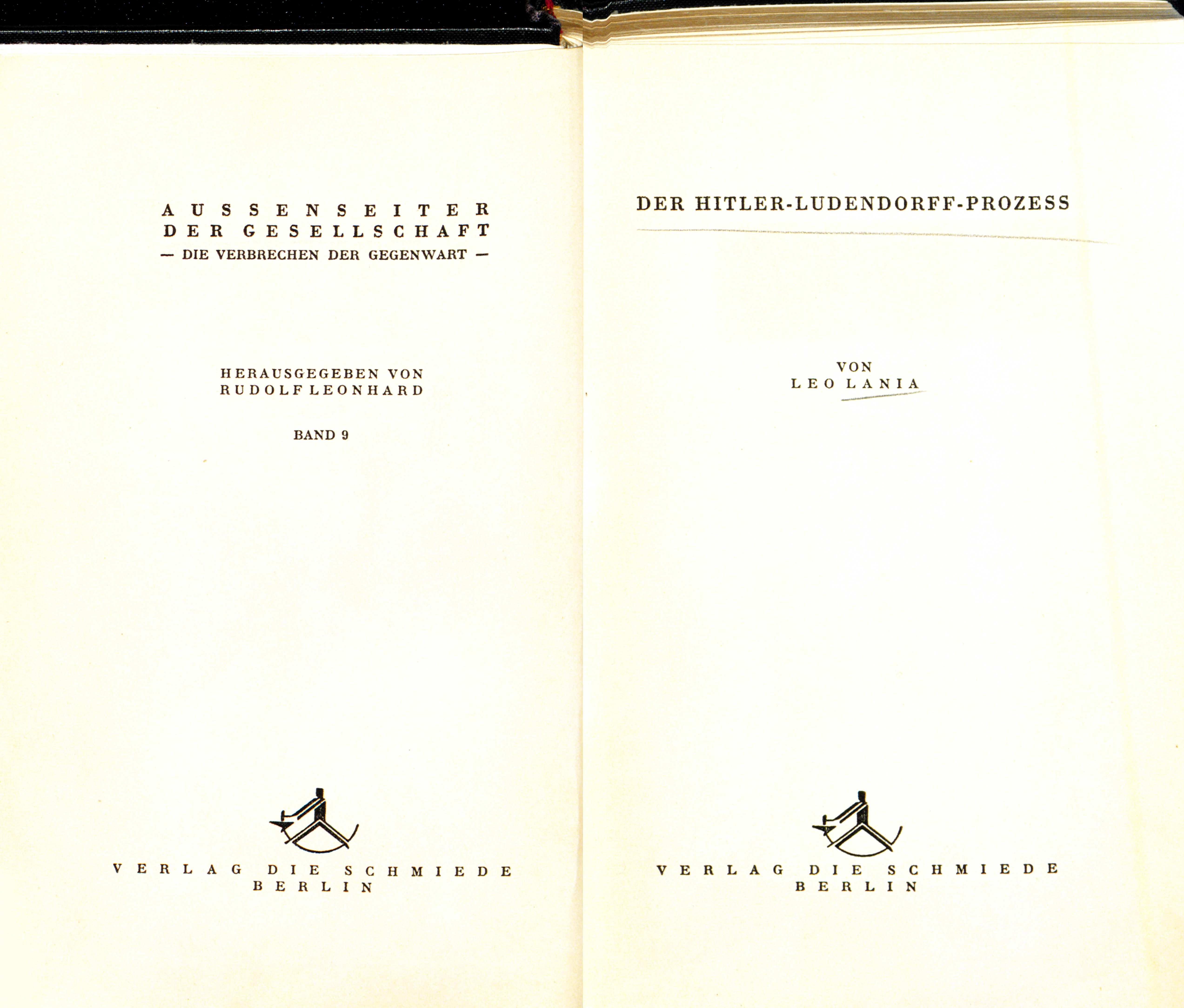 Leo Lania Der Hitler-Ludendorff-Prozess, 1925 Titel